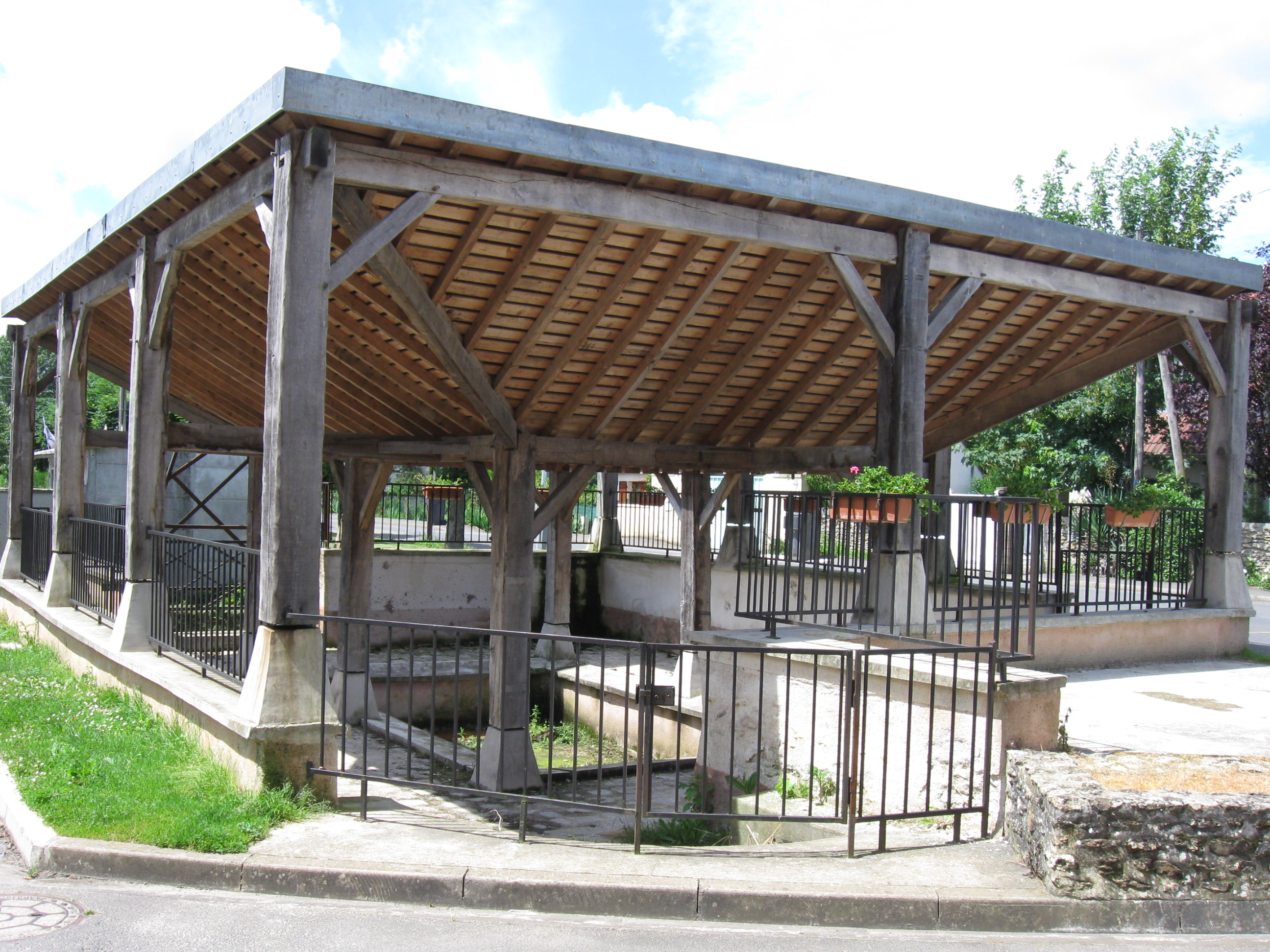 Lavoir de Chevru. (Seine-et-Marne, région Île-de-France).